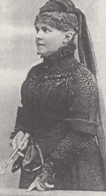 Photography of Elisabeth Förster-Nietzsche